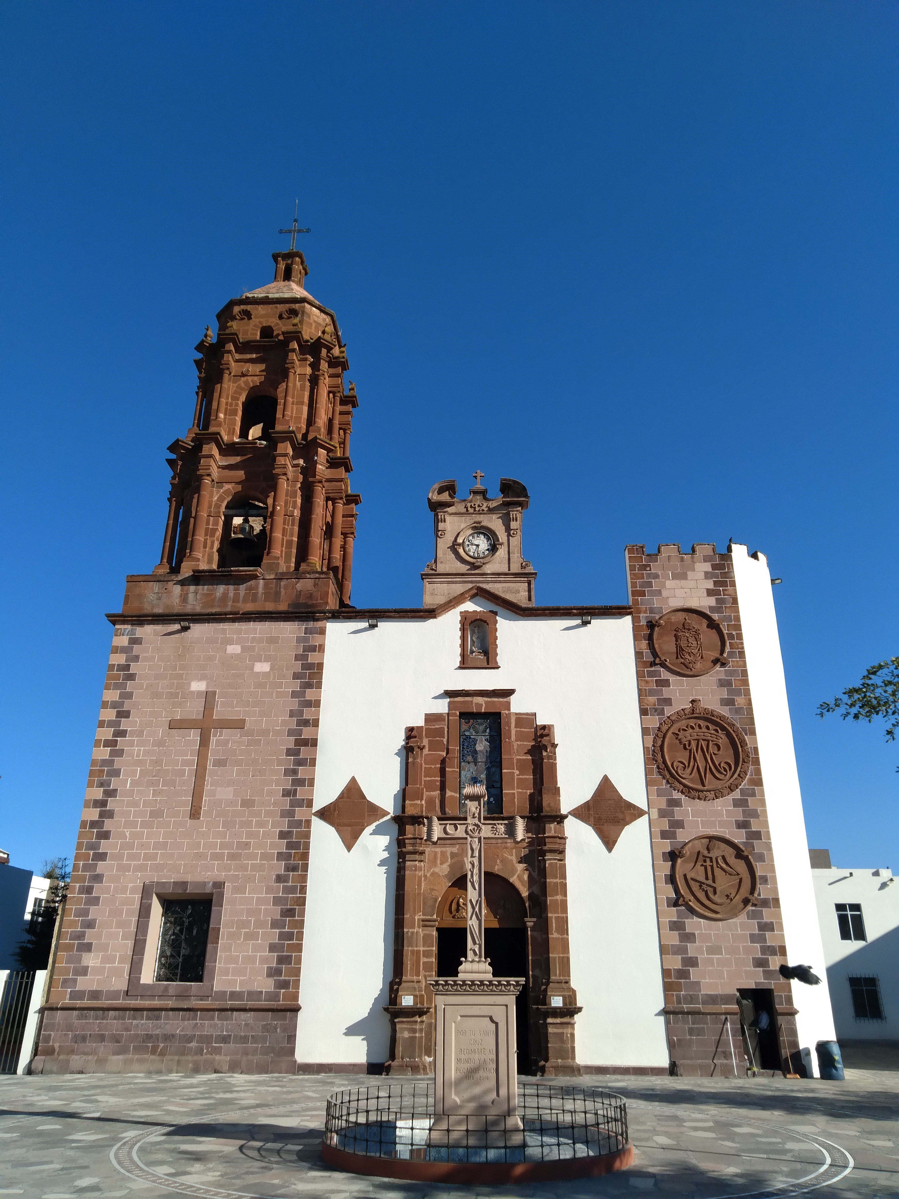 Parroquia de la purísima concepción en Yurécuaro Michoacan